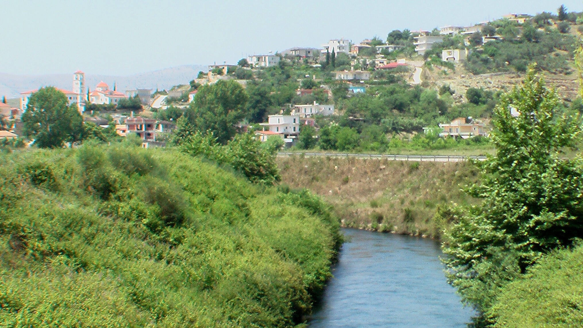 MesopotamAmFlussBistrica